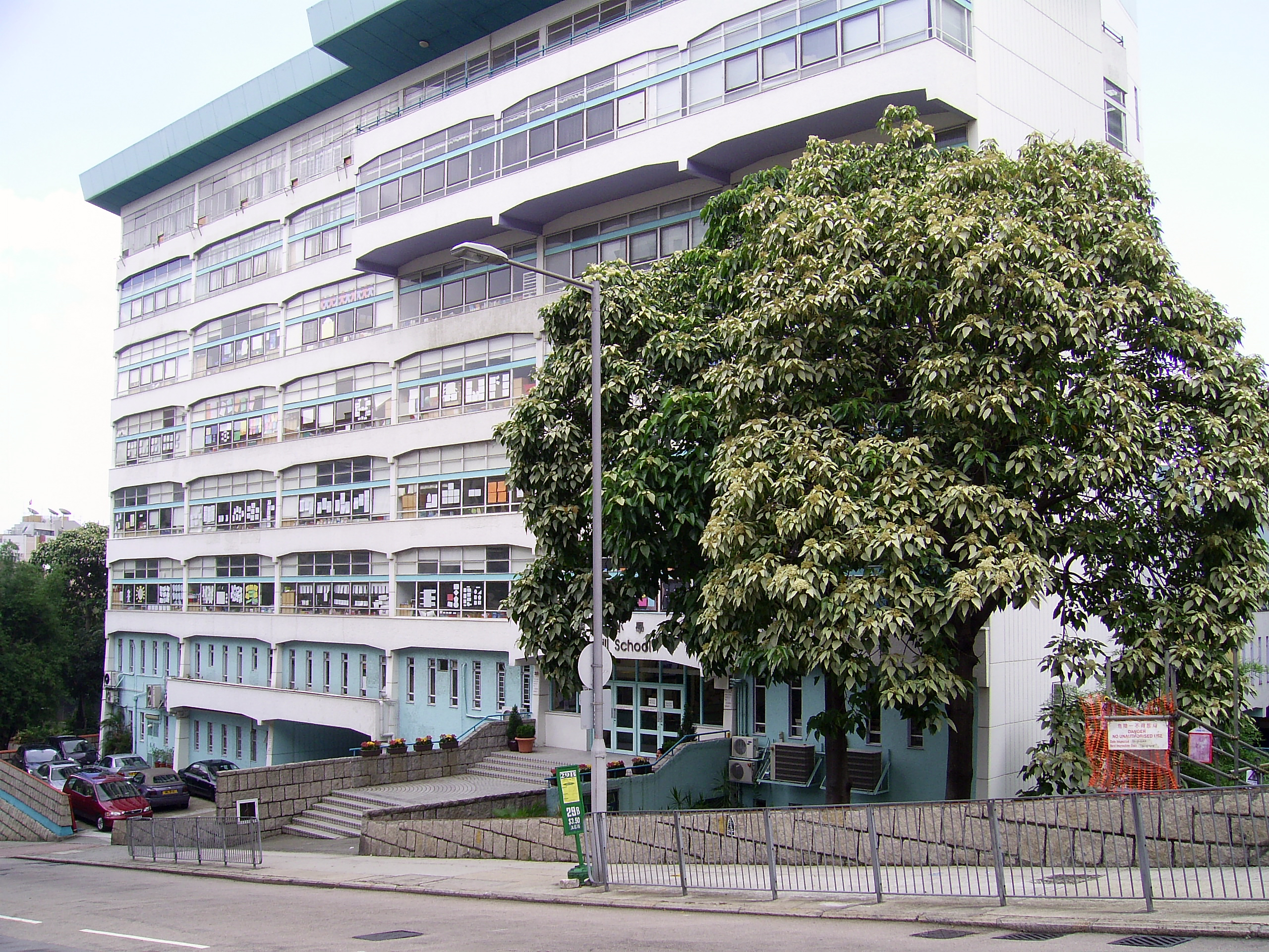 畢架山學校